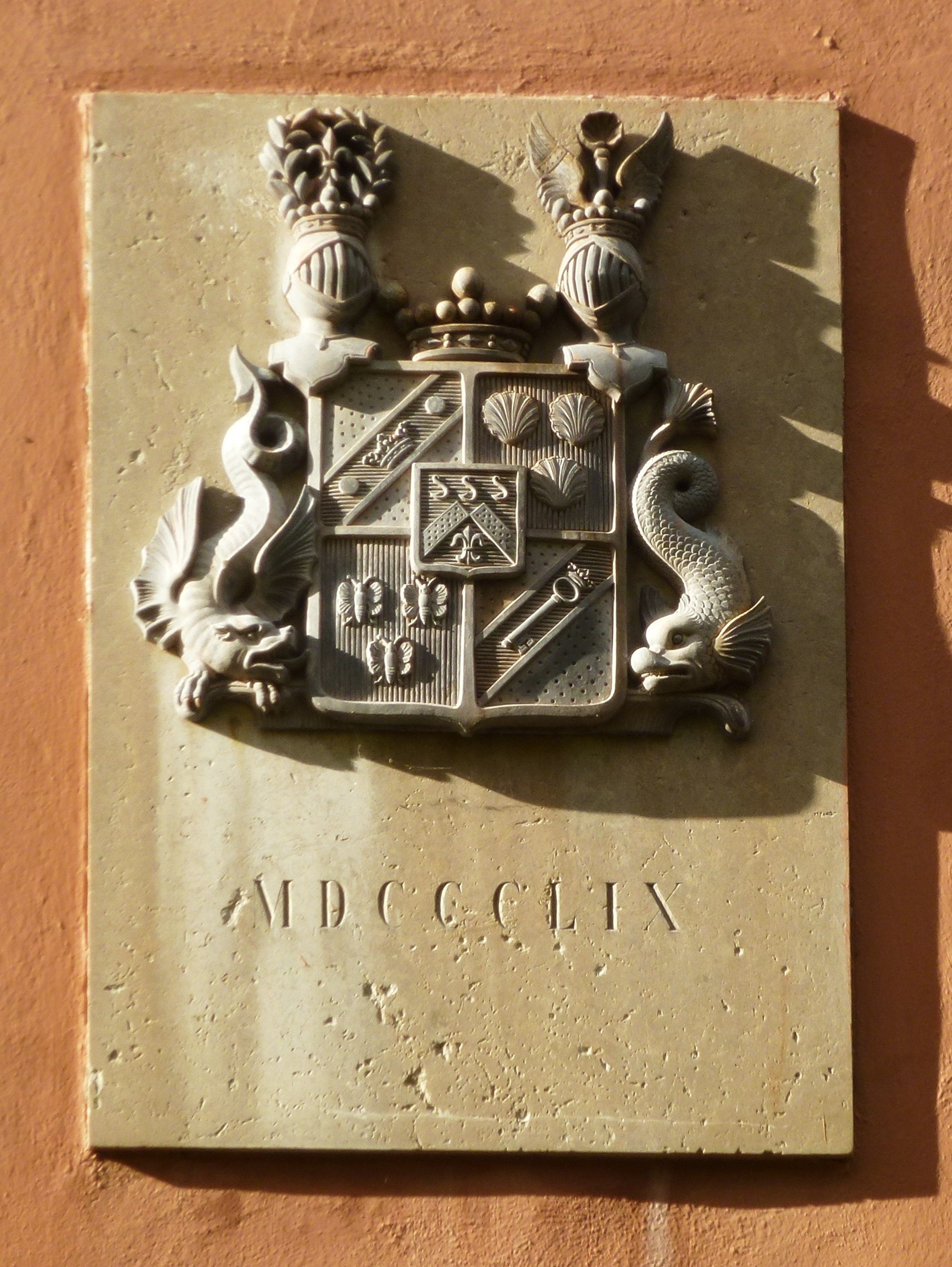 Norsborgs herrgård, vapen på tornet